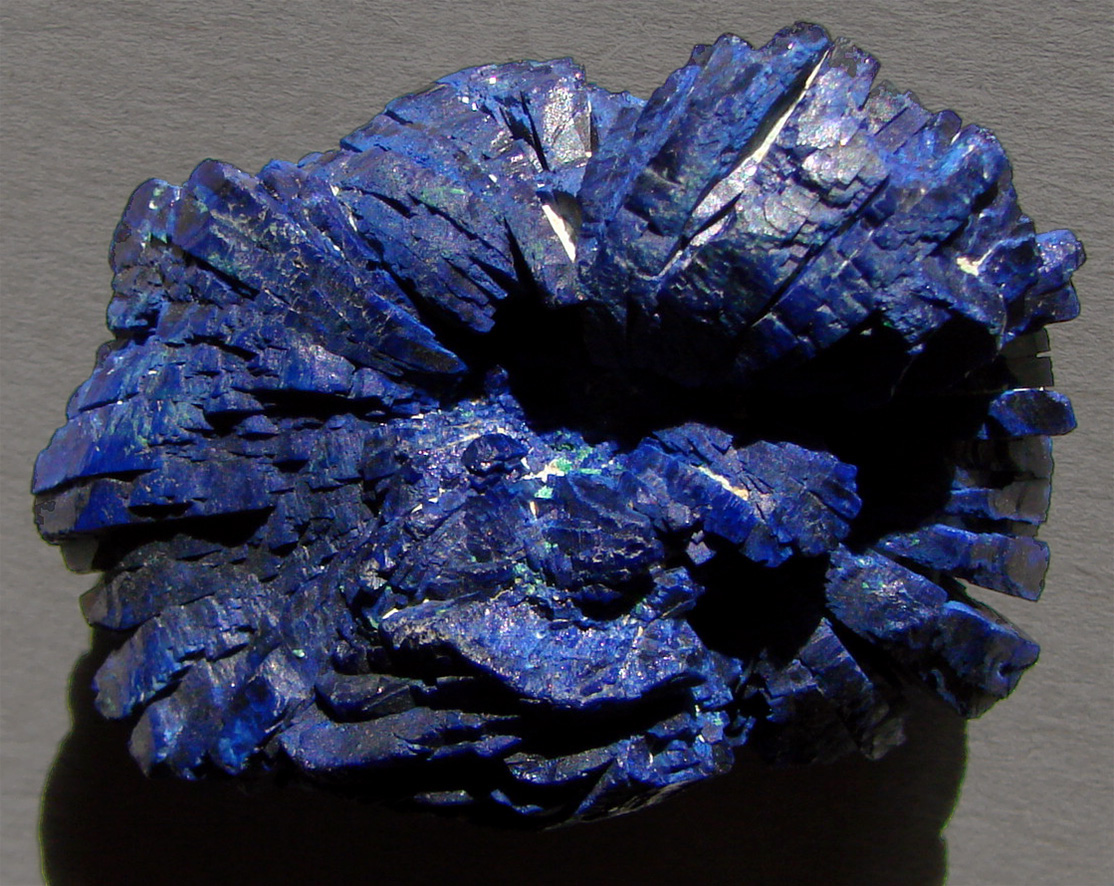 Azurite, USA